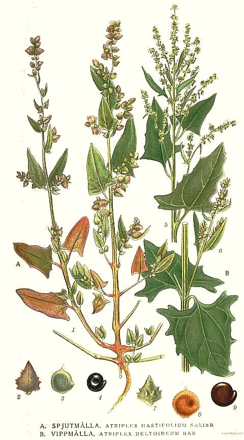 A. Atriplex prostrata DC. (probably a form on saline soils) B. Atriplex prostrata DC. Original Description A. Spjutmålla, Atriplex hastifolium Salisb. B. Vippmålla, Atriplex deltoideum Bab.